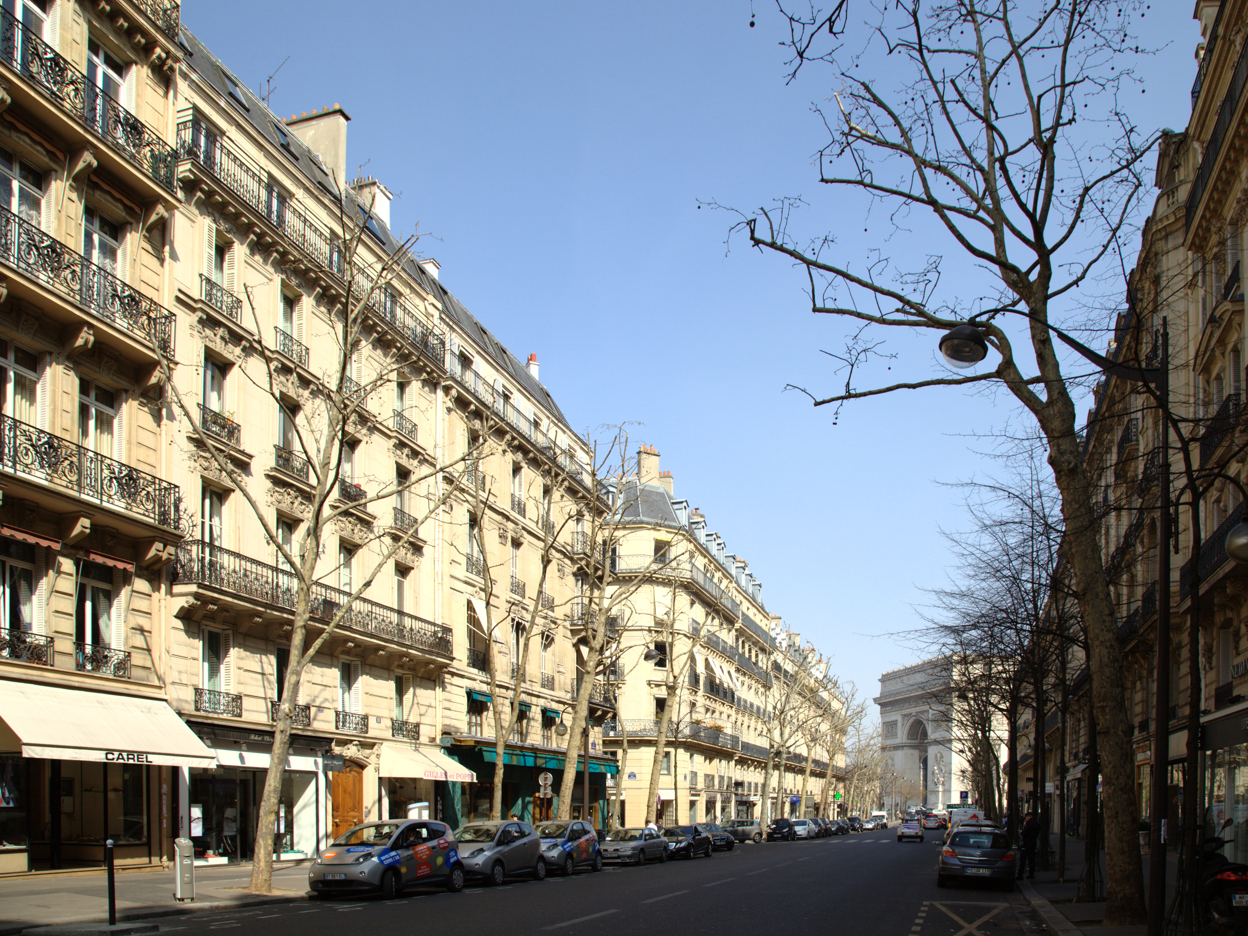 L'avenue Victor-Hugo à Paris, vue vers la place de l'Étoile